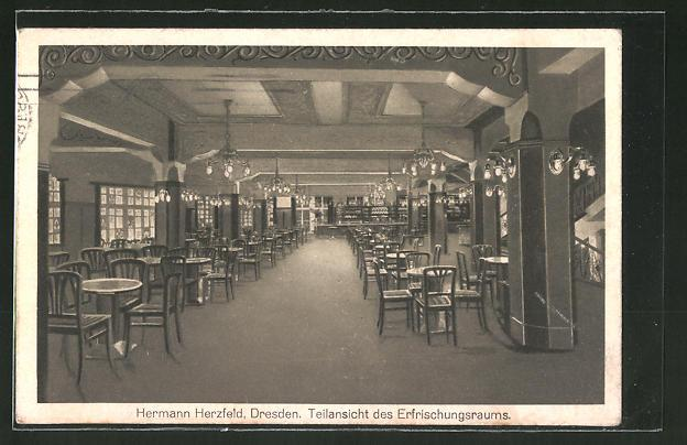 Erfrischungsraum des Kaufhauses Herzfeld, Postkarte, gelaufen 1914